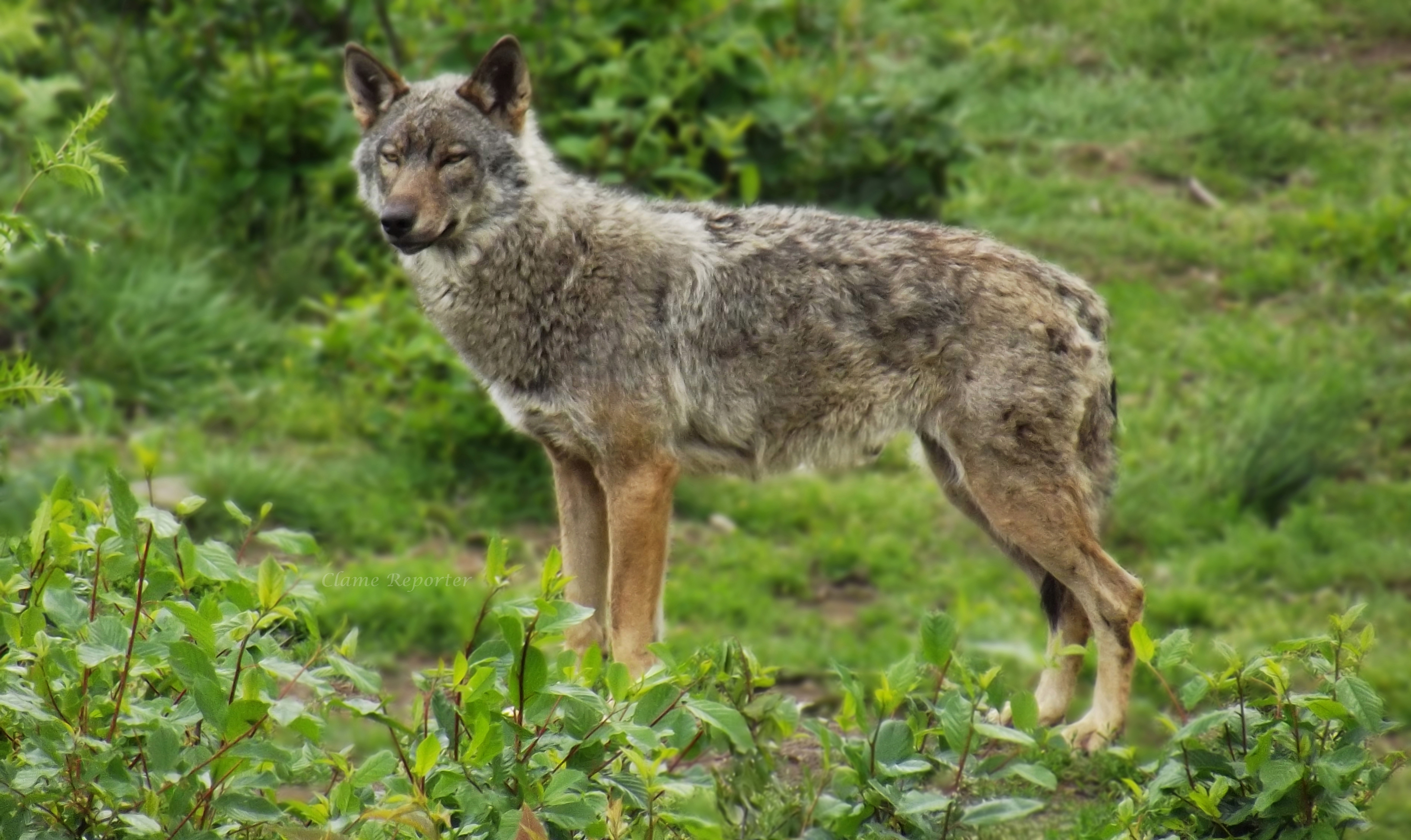 Ayant connu une extermination de masse au début du XXème siècle, le Loup avait totalement disparu du territoire français avant qu'il ne revienne dès 1992. En effet, sa présence est certifiée dans les Alpes, dans les Pyrénées, dans le Massif-Central ainsi que dans le Jura et les Vosges. Elle est suspectée dans les Monts de Guéret et dans les zones périphériques des reliefs. Le Loup est une espèce rare et très discrète en France. Aujourd'hui, il suscite de nombreux débats écologiques et économiques concernant notamment son statut de protection.